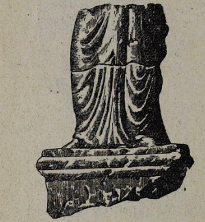 Կավե արձան